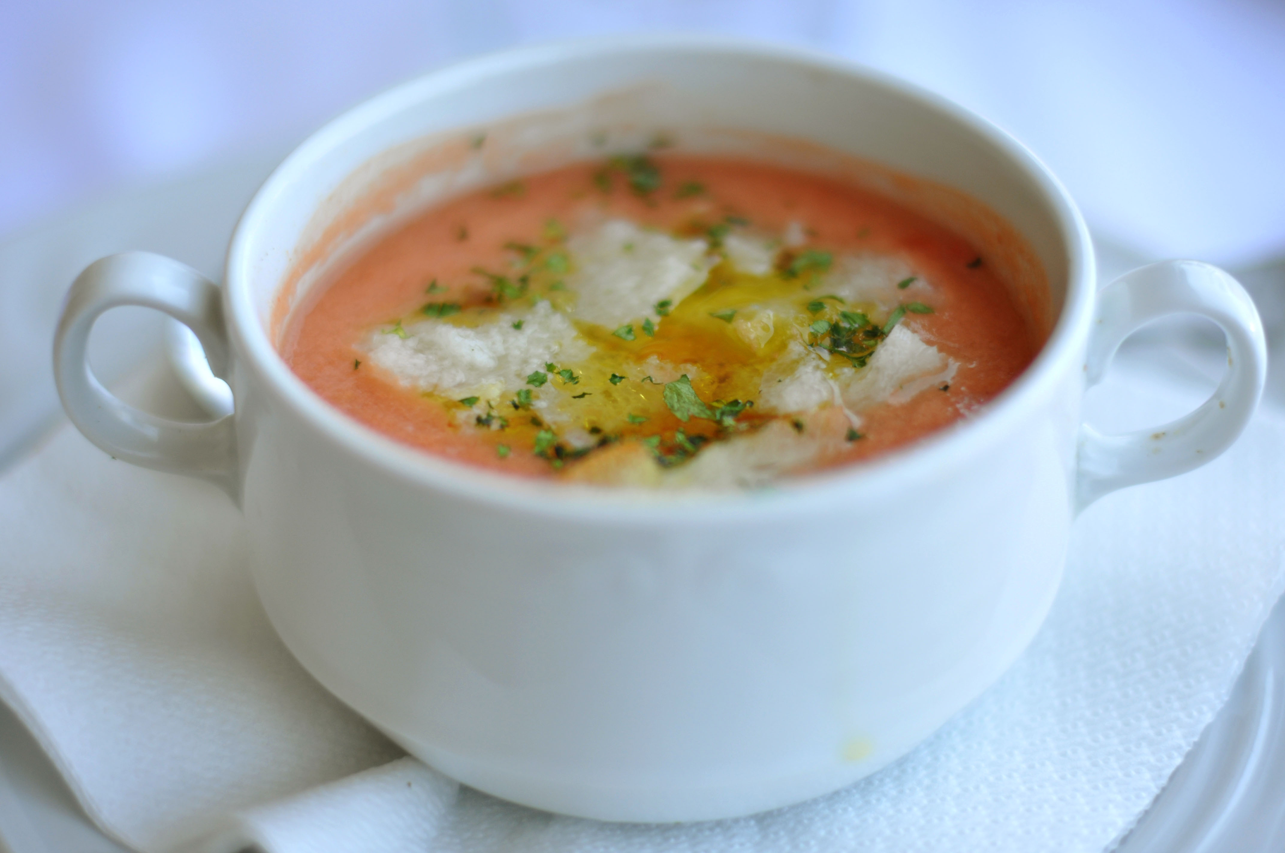 Gazpacho